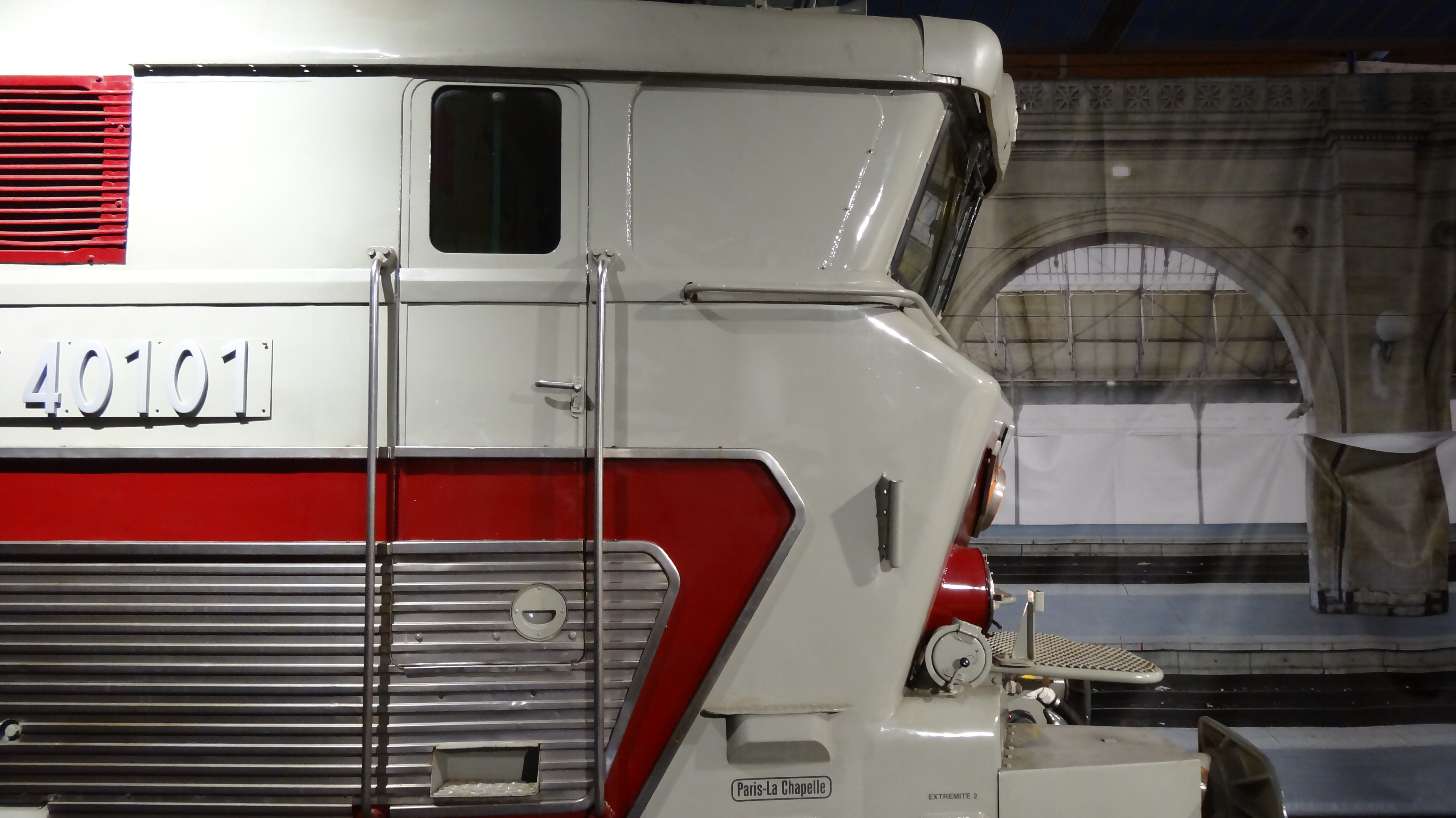 Cite du Train Mulhouse 2014 165